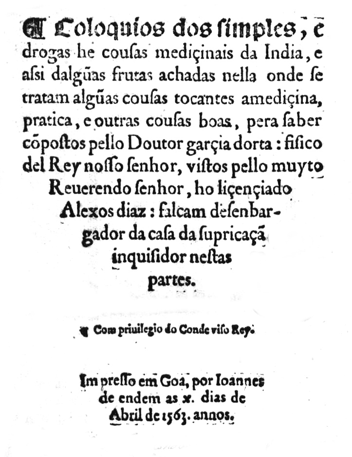 Frontispício do Colóquio dos Simples de Garcia de Orta. Goa, 1563. Transcrição: A Coloquios dos ſimples, e drogas he couſas mediçinais da India, e aſsi dalgũas frutas achadas nella onde ſe tratam algũas couſas tocantes amediçina, pratica, e outras couſas boas, pera ſaber cõpoﬅos pello Doutor garçia dorta: ﬁſico del Rey noſſo ſenhor, viﬅos pello muyto Reurendo ſnhor, ho liçençiado Alexos diaz: falcam deſenbargador da caſa da ſupricaçã inquiſidor neﬅas partes. Com priuilegio do Conde viſo Rey. Im preſſo em Goa, por Ioannes de endem as x. dias de Abril de 1563. annos.